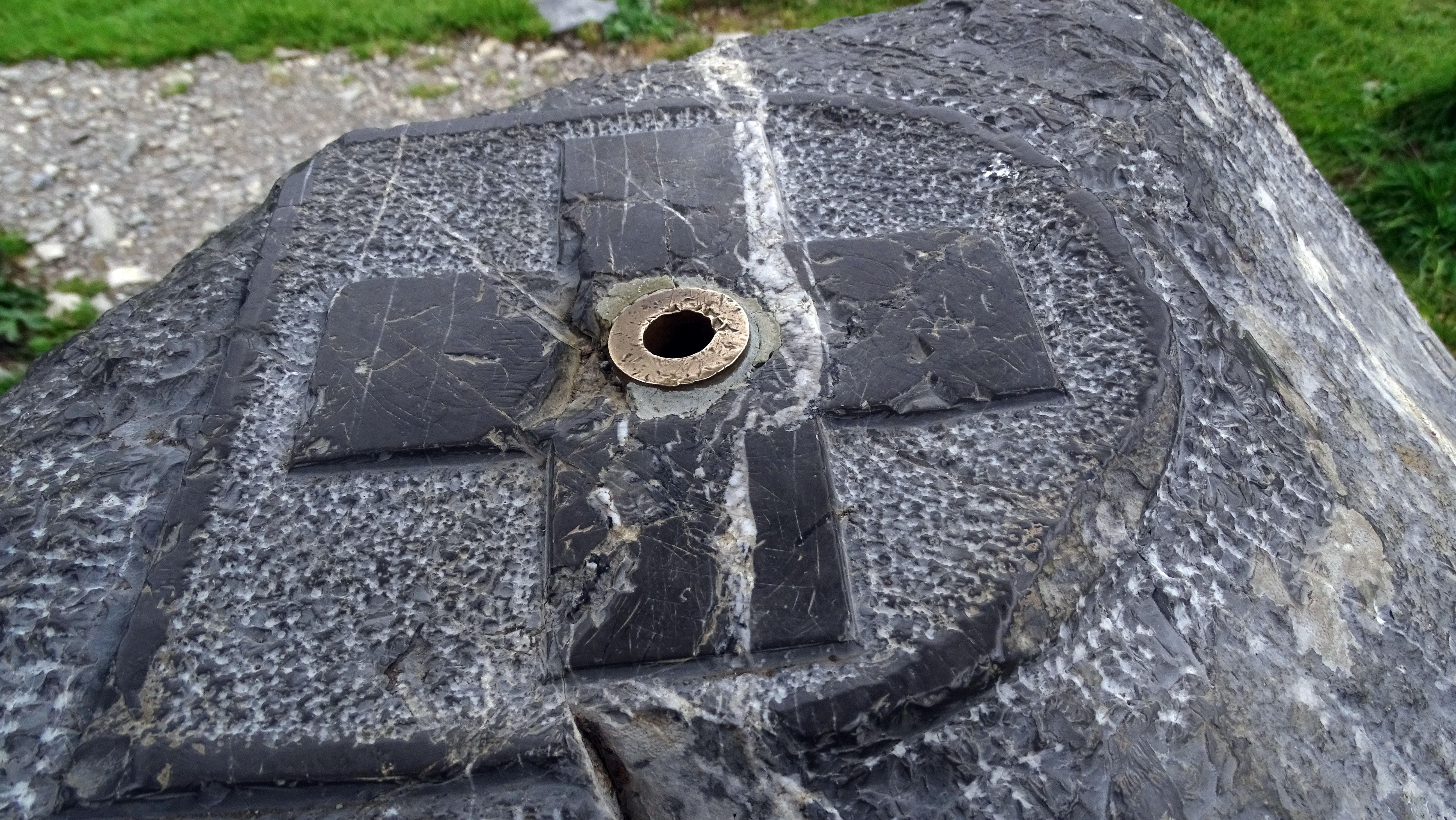 Auf der Älggi Alp (1635 m.ü.M.).Die Älggi-Alp ist die grösste Alp der Gemeinde Sachseln im Kanton Obwalden in der Schweiz. Auf ihr liegt der geografische Mittelpunkt der Schweiz. Der geografische Mittelpunkt ist eigentlich ein Flächenschwerpunkt auf dem man die Schweiz theoretisch gleichmässig auszubalancieren könnte.